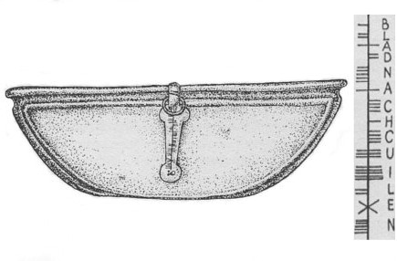 Abzeichnung der Ogham-Inschrift Inschrift BLADNACH CUILEN auf der Kilgulbing-Hängeschüssel. Die Inschrift befindet sich außen auf einem Plättchen, das mit dem Aufhängehaken verbunden und auf der Außenseite der Schüssel befestigt ist. Die Ogham-Zeichen werden vom Haken aus von oben nach unten gelesen. Im Bild ist eine der drei Seiten der Schüssel von Kante zu Kante zu sehen. Auf den anderen Seiten ist keine Ogham-Inschrift. Die Kilgulbin-Hängeschüssel wurde 1927 in einem Moor im Townland Kilgulbin East in der Nähe von Ardfert, Grafschaft Kerry, Irland, entdeckt. Die Hängeschüssel selbst wird auf etwa 400 n. Chr. datiert, die Ogham-Inschrift ist zwischen 650 und 800 n. Chr. erfolgt